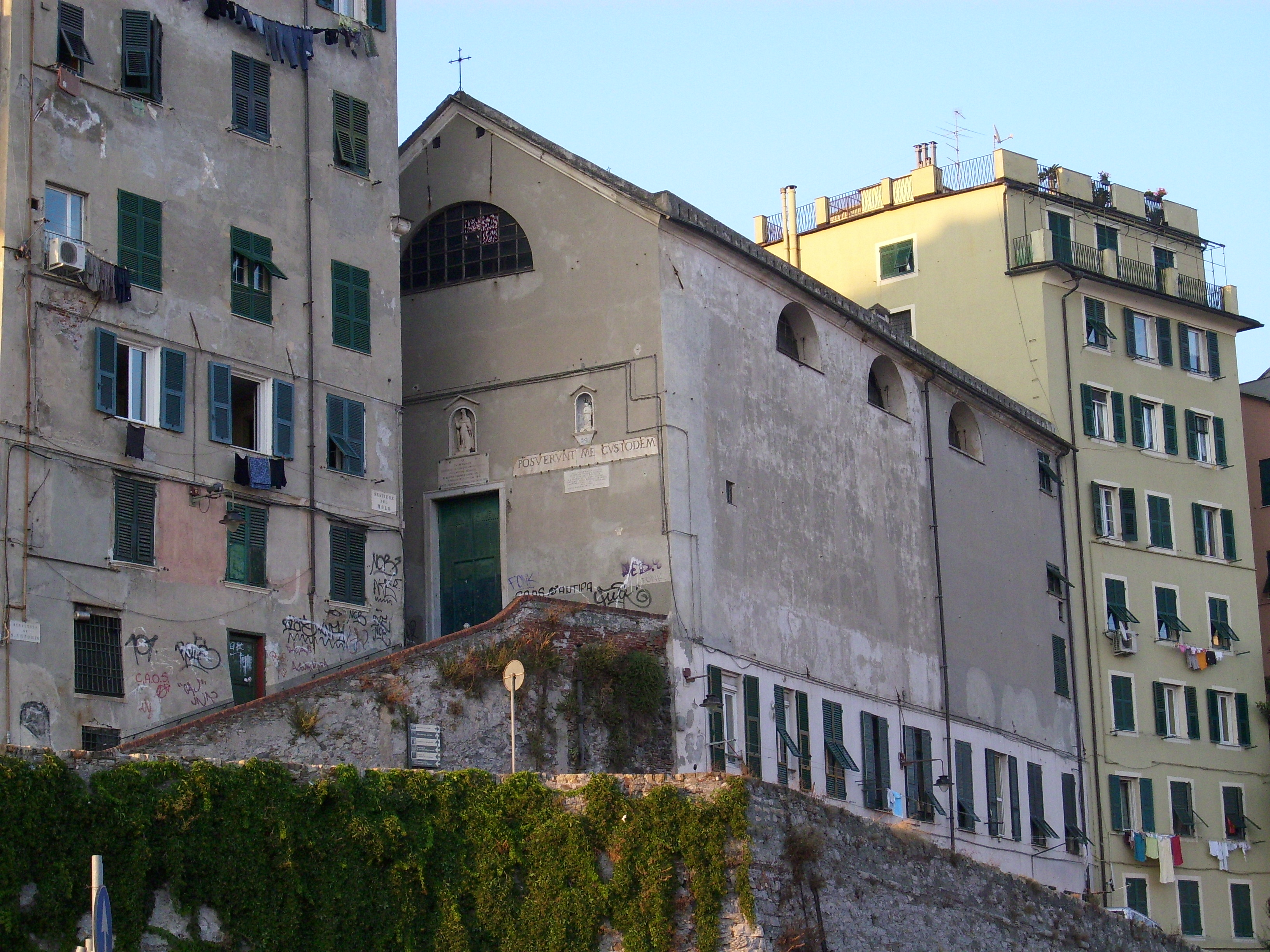 Chiesa di Sant'Antonio in vico sotto le Murette, a Genova